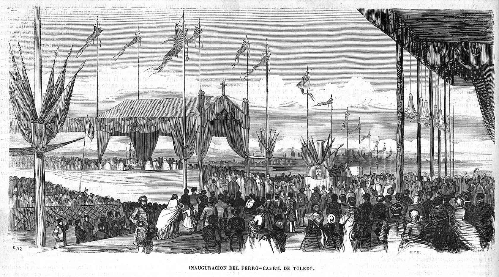 «Inauguración del ferro-carril de Toledo».